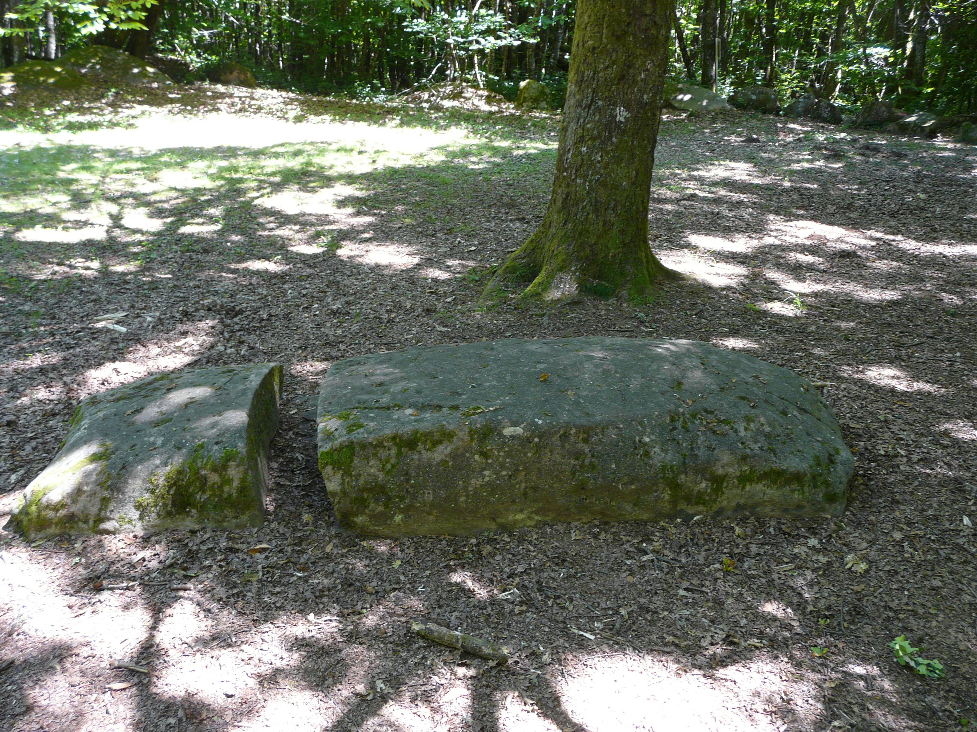 Le menhir couché et fendu du cromlech du Puy de Pauliac, Aubazines, Corrèze, France.